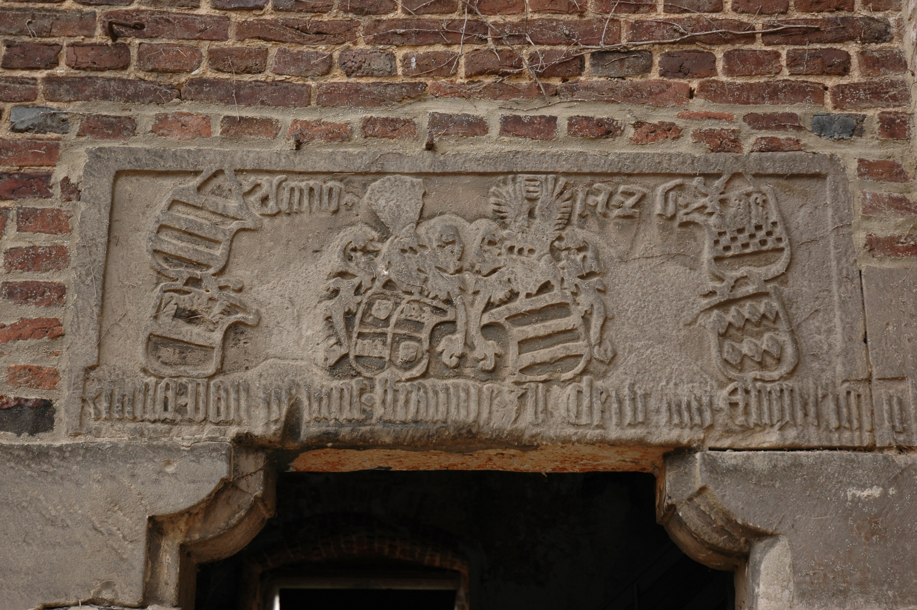 Burg Engelsdorf, Wappenstein über dem Eingang des Palas